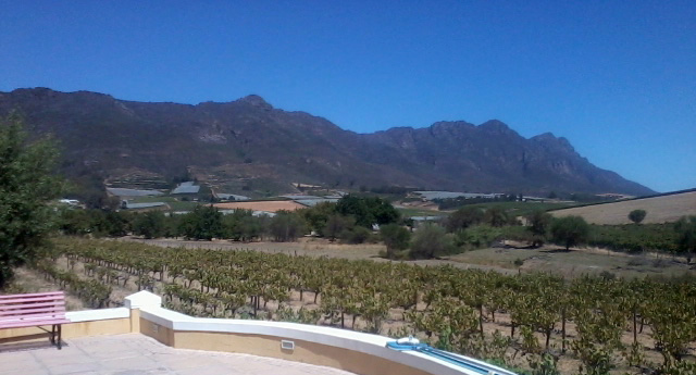 La réserve naturelle de Kasteelberg (Kasteelberg Nature Reserve) vue depuis Riebeek-Kasteel